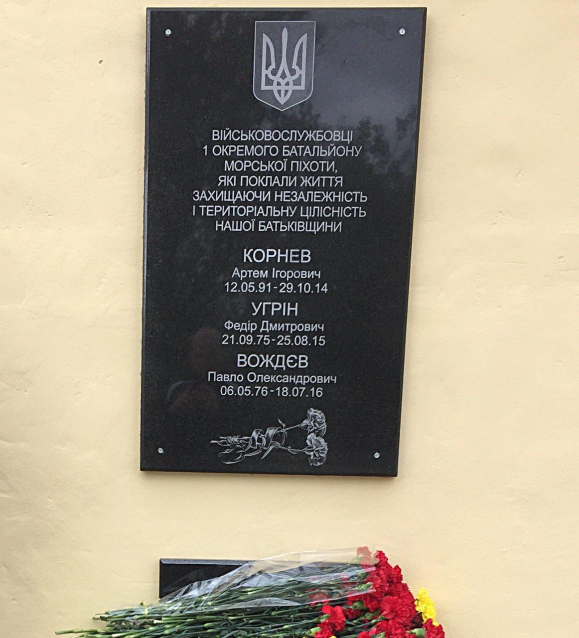 Меморіал загиблим з 1-ОБМП, знаходиться на території в.ч.